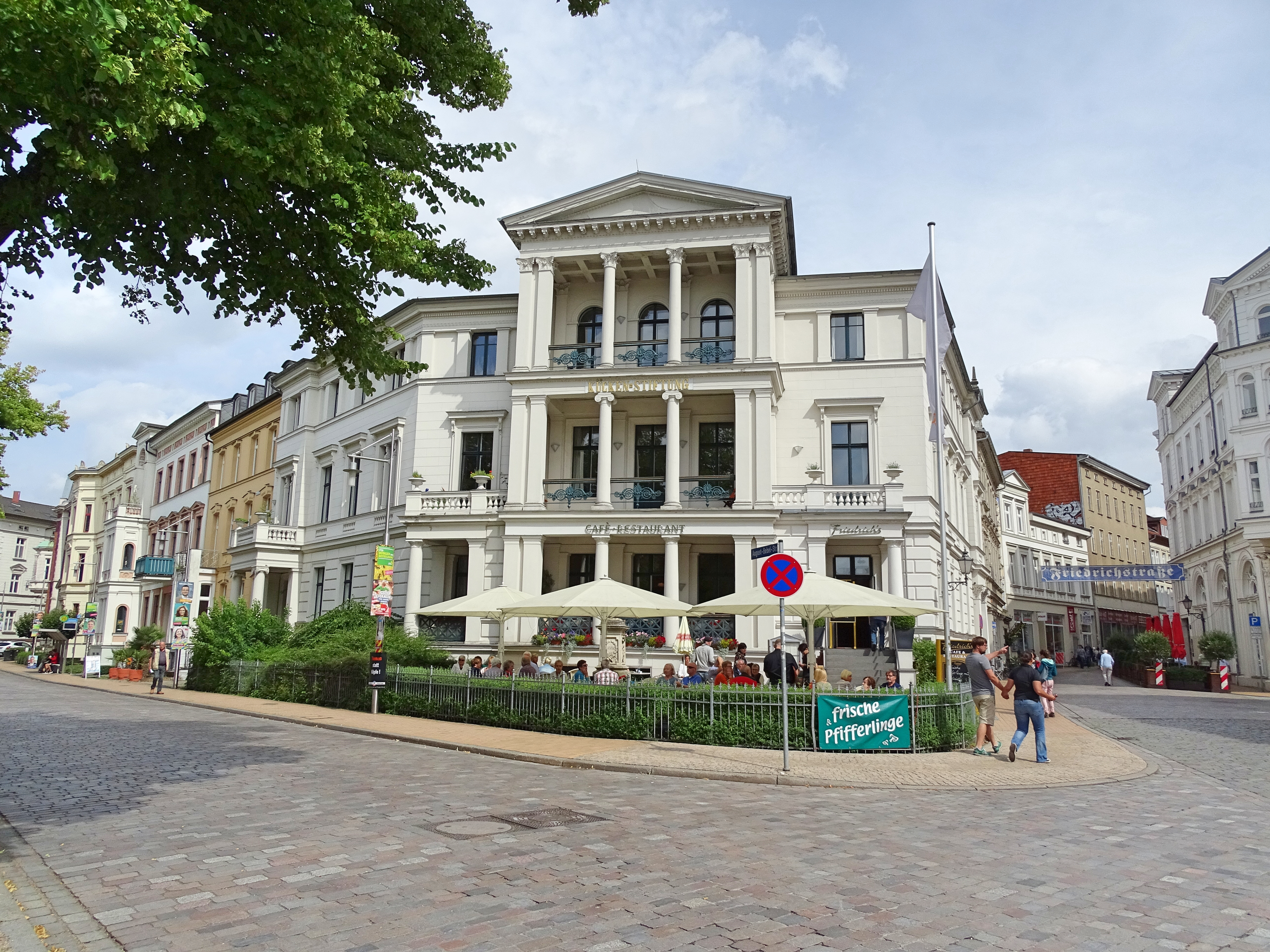 Schwerin, Germany